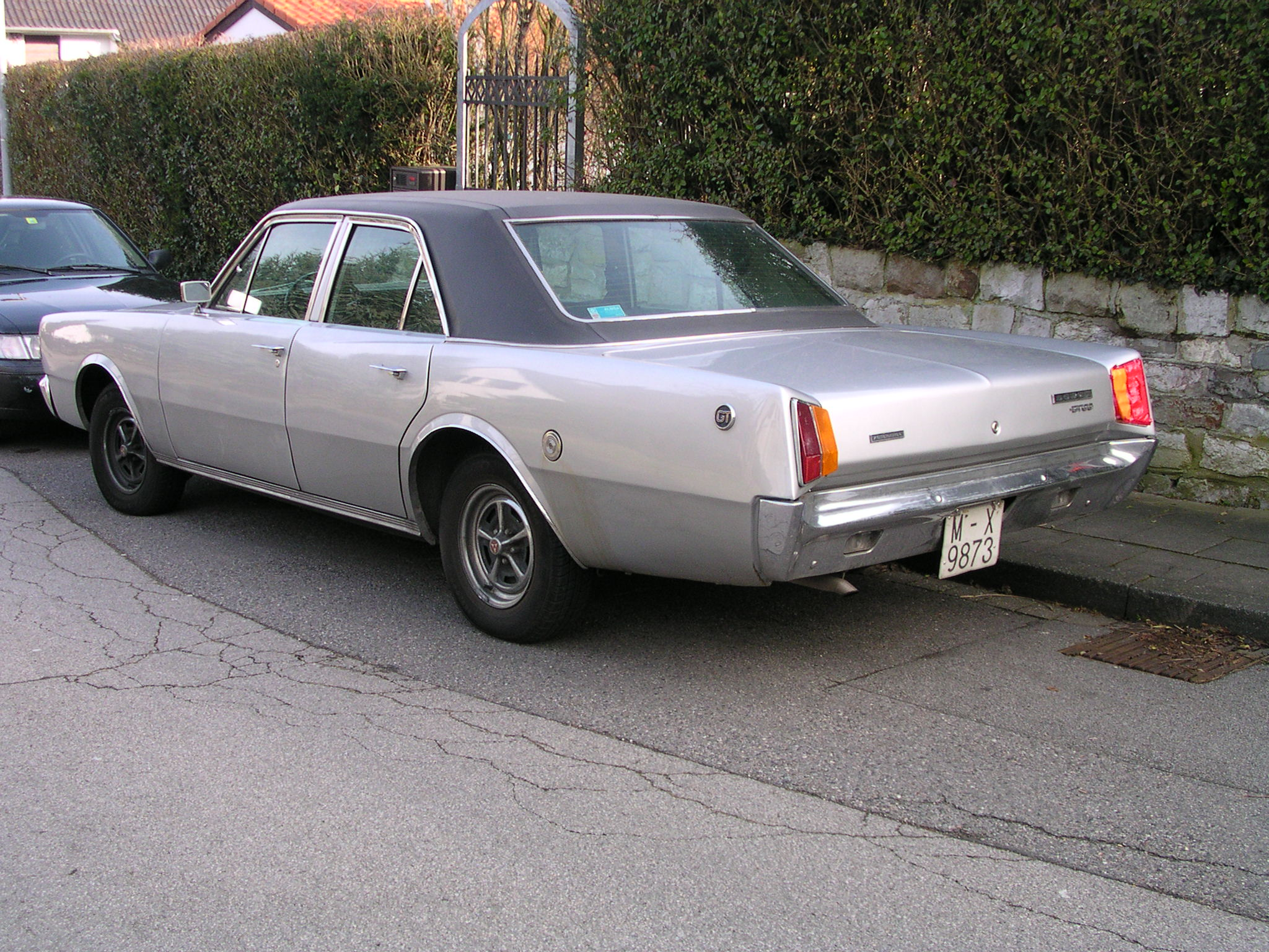 Dodge, dürfte wohl ein 3700 GT sein, das spanische Schwestermodell vom Dart.